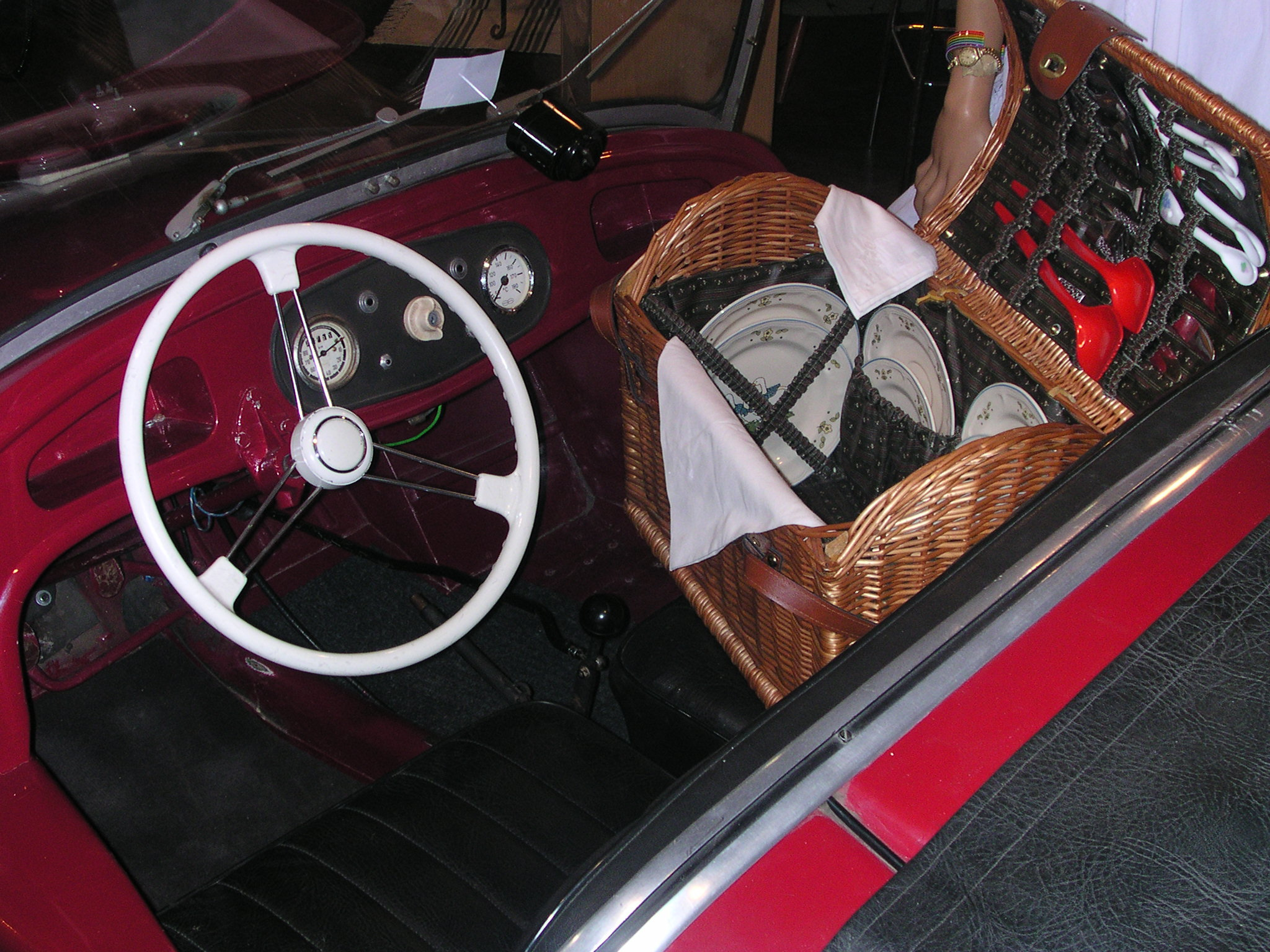 Kleinschnittger, gesehen bei der Technoclassica in Essen 2005